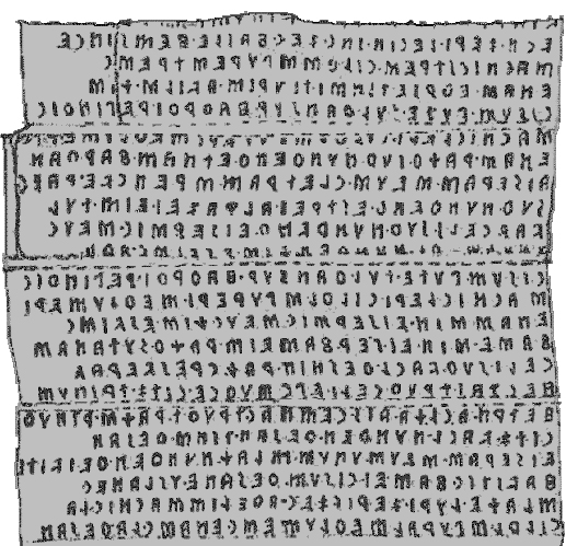 Απόγραφον της 5ης στήλης του Liber Linteus